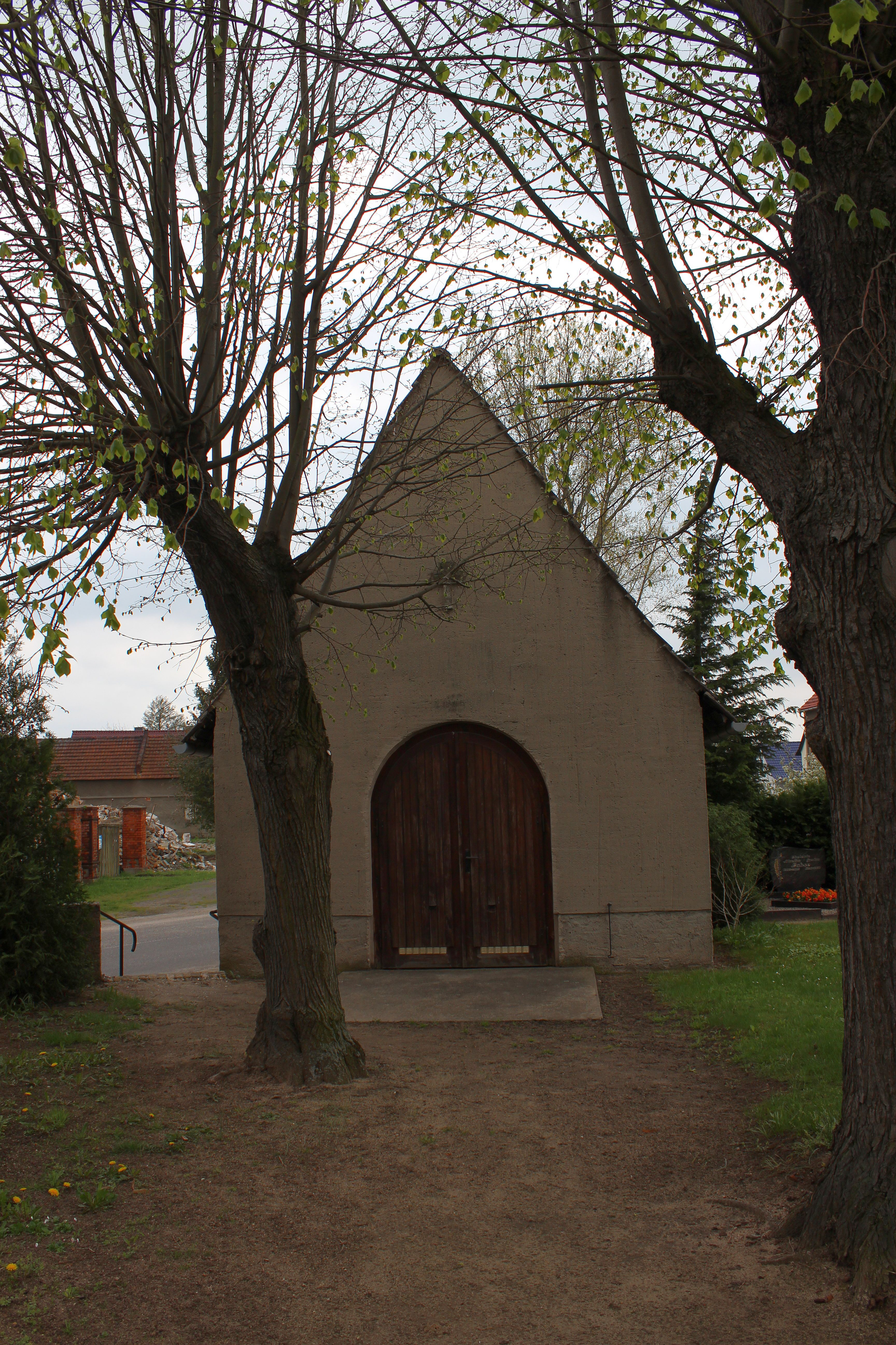 Bönitz.